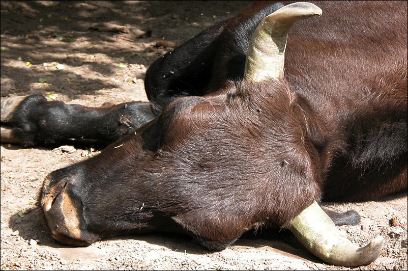 p1=Śpiący samiec żubronia w Rezerwacie Pokazowym w Białowieży.